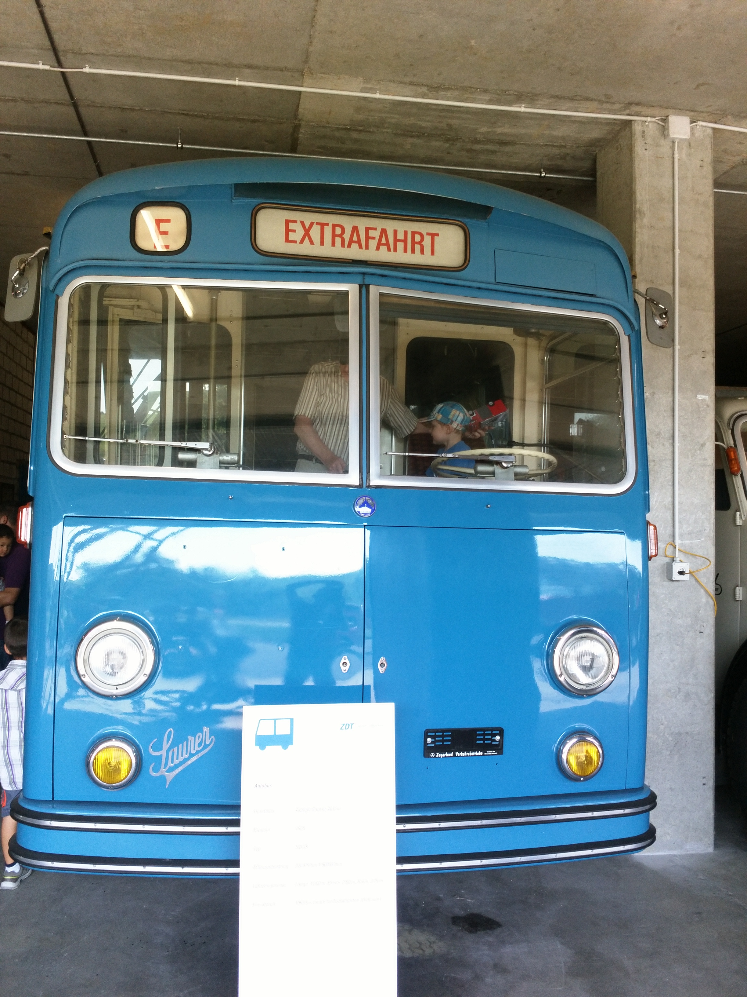 Saurer 5 DUK ZVB Front